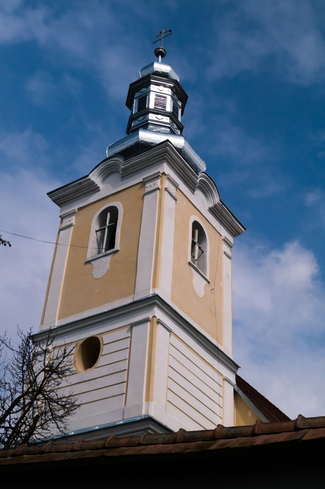 Deményháza, katolikus templom